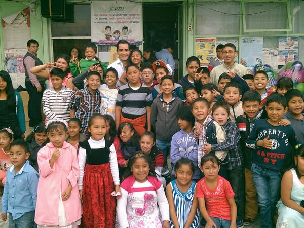 Francisco Chico López Barrera en festejo del Día del Niño en Toluca